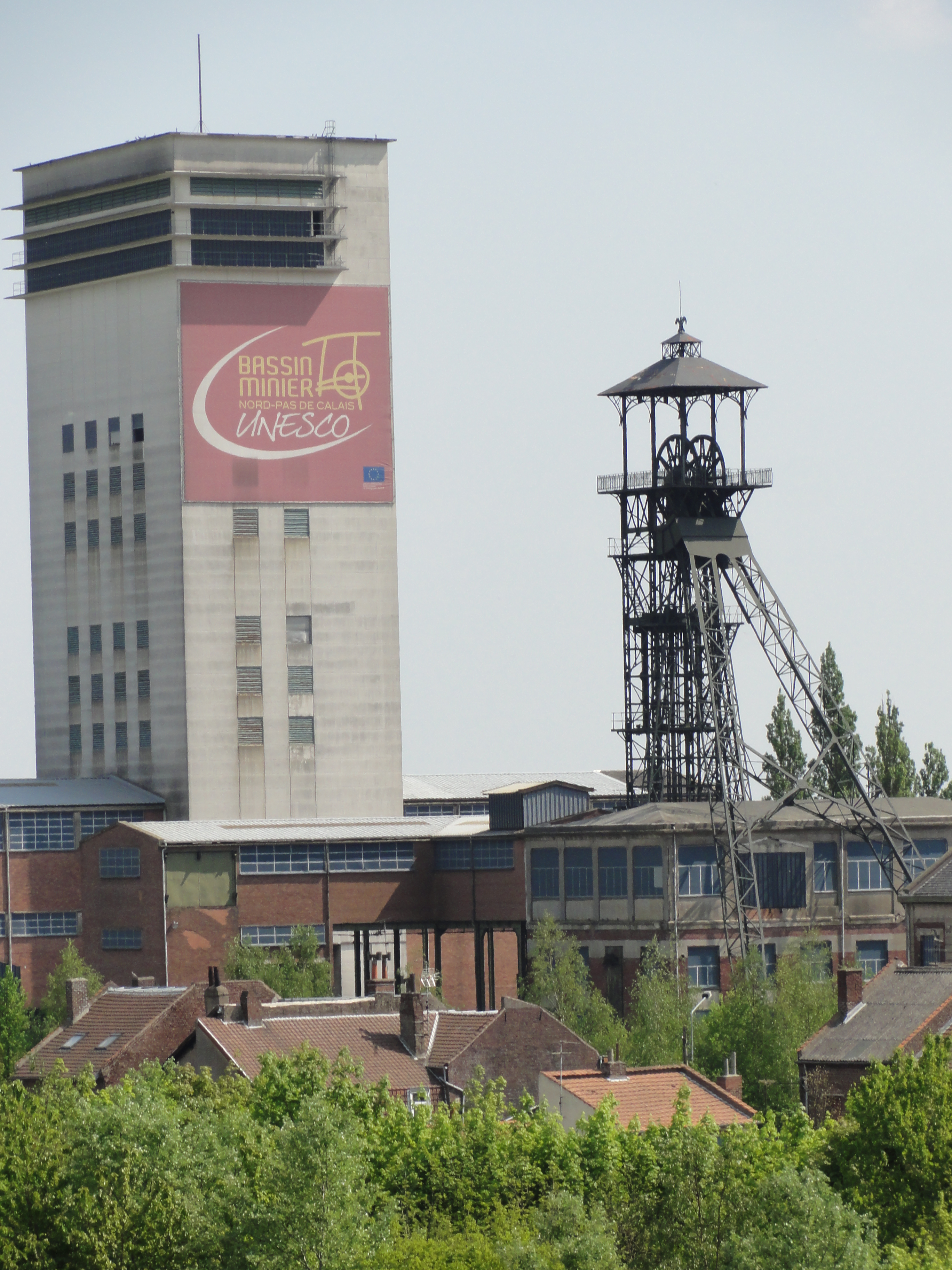 La fosse no 11 - 19 de la Compagnie des mines de Lens était un charbonnage du bassin minier du Nord-Pas-de-Calais constitué de deux puits situé à Loos-en-Gohelle, Pas-de-Calais, Nord-Pas-de-Calais, France. La fosse d'aérage no 11 bis est située sur un autre carreau. Les installations de surface de la fosse no 11 - 19 sont classées aux monuments historiques le 21 décembre 2009, venant remplacer l'inscription du 6 mai 1992. La fosse est également inscrite sur la liste du patrimoine mondial par l'Unesco le 30 juin 2012 et y constitue en partie le site no 63. It is indexed in the Base Mérimée, a database of architectural heritage maintained by the French Ministry of Culture, under the references PA00108467 and IA62000547 .